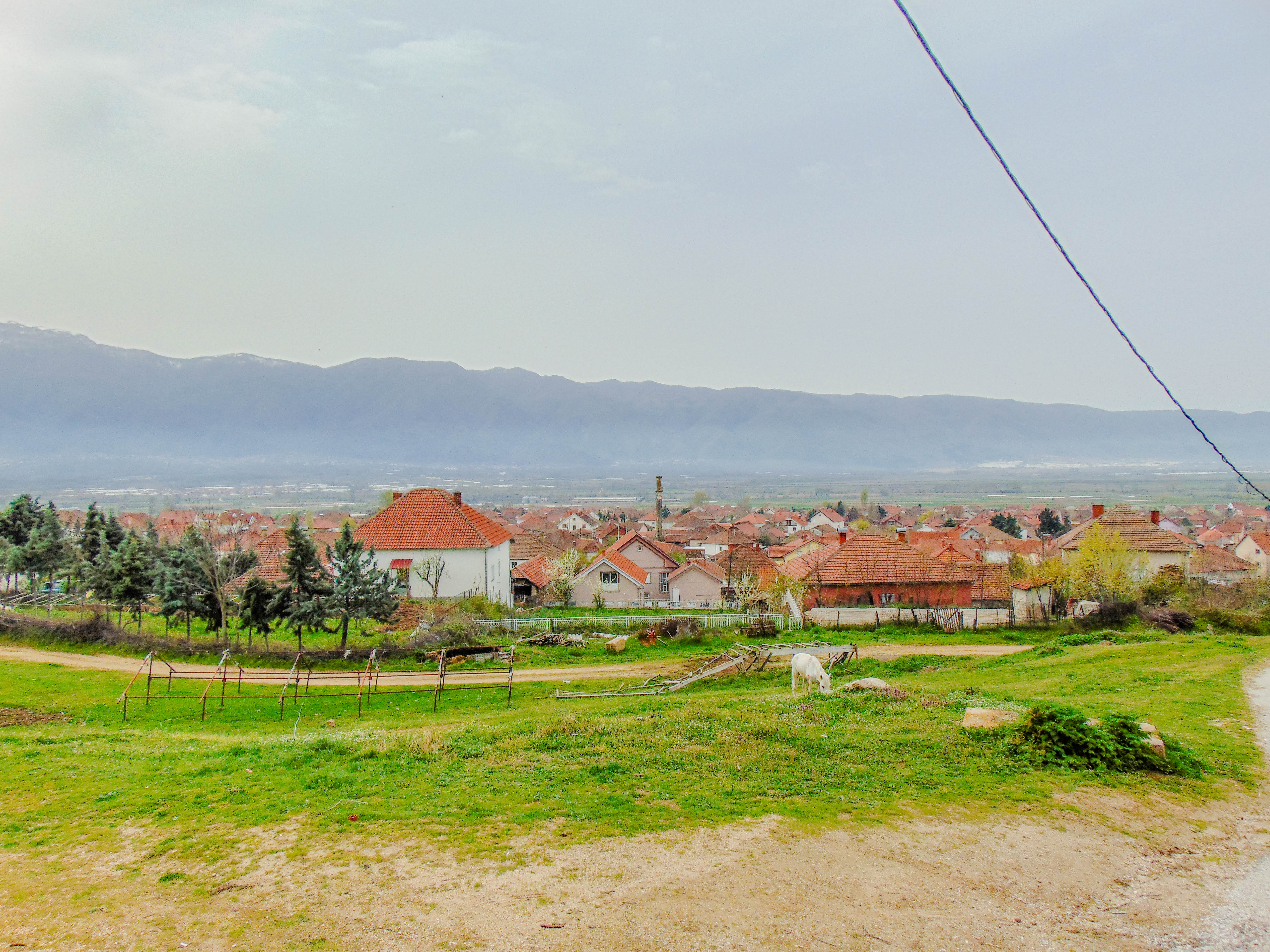 Сушица